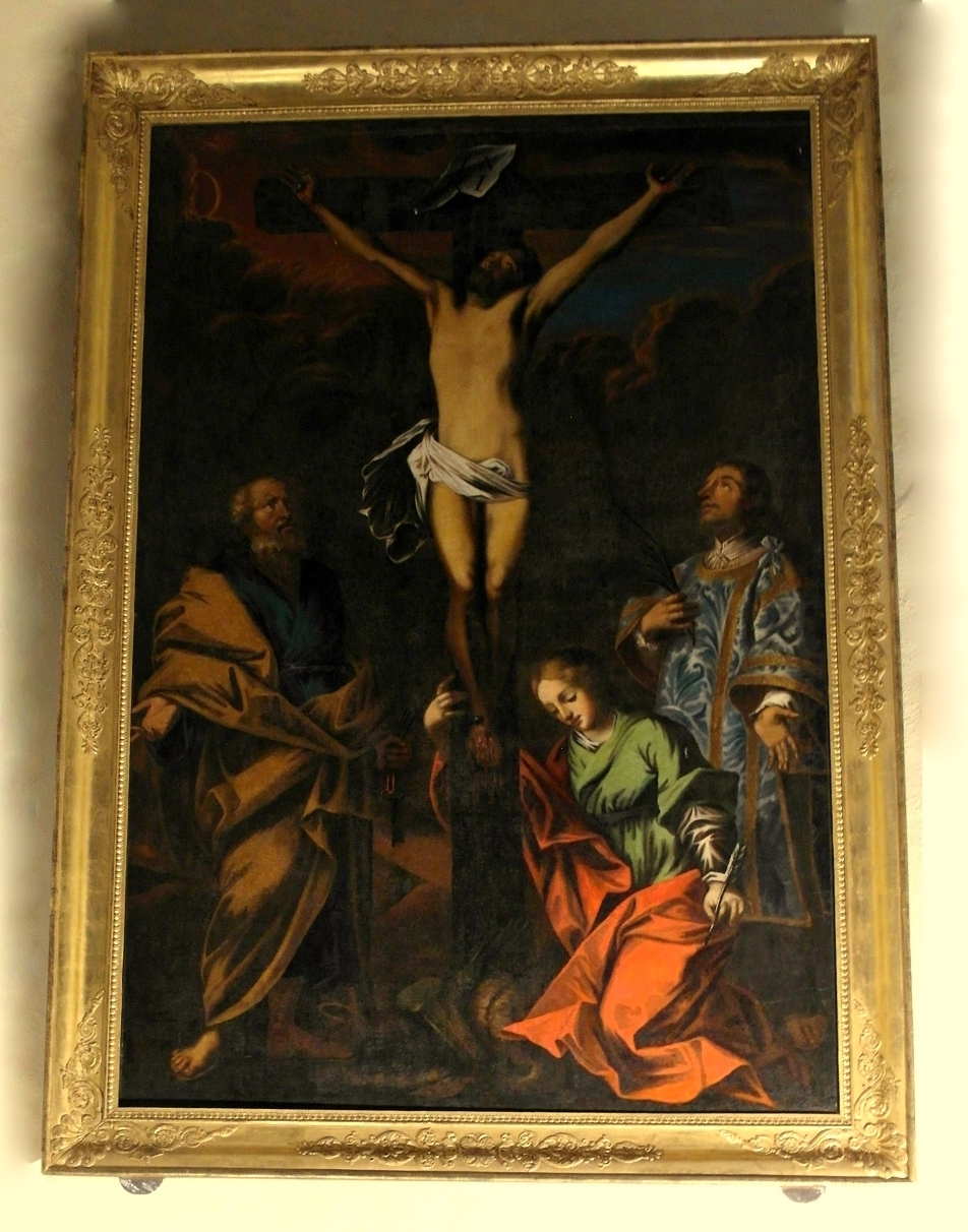 Laroque - Chapelle Saint-Jean - Tableau de la Crucifixion.